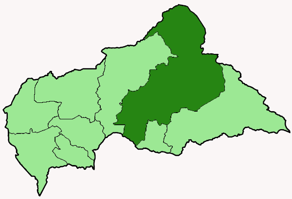 Mappa della diocesi cattolica di Bambari, nella Repubblica Centrafricana. Anno 2009.